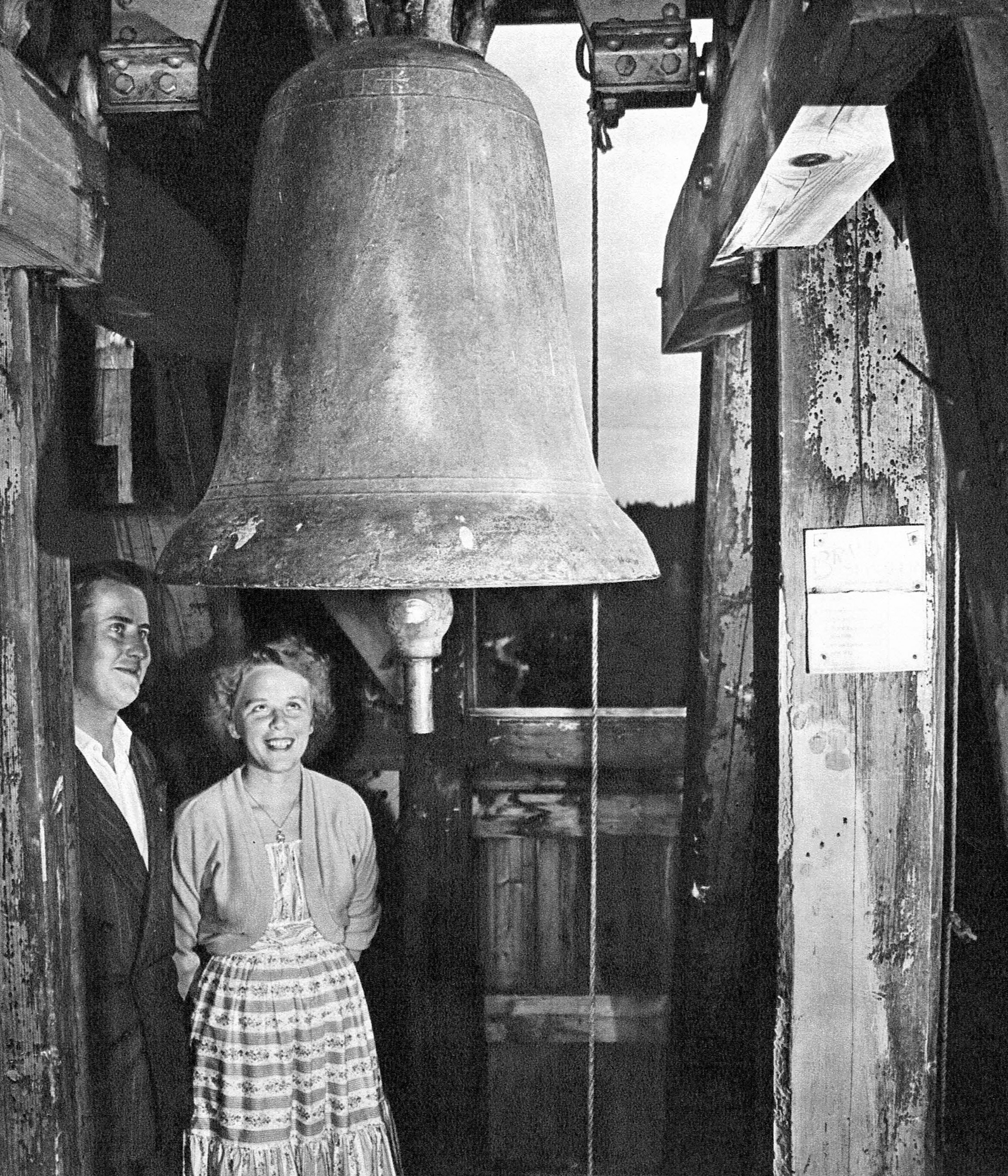 Ödskölts kyrka. Sveriges äldsta i bruk varande kyrkklocka från 1100-talet.